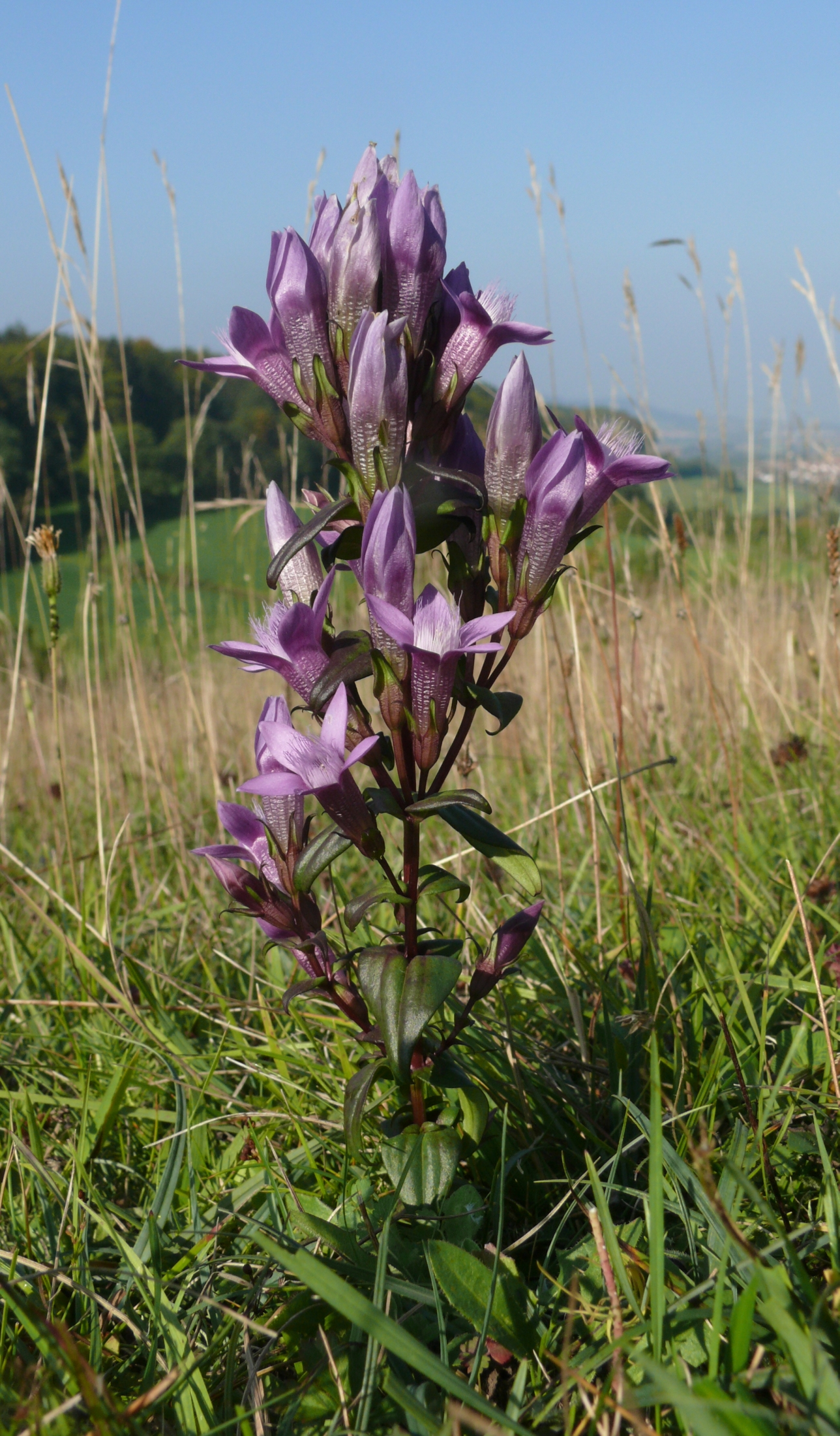 Gentianella germanica, Schwäbisch Alb, Germany